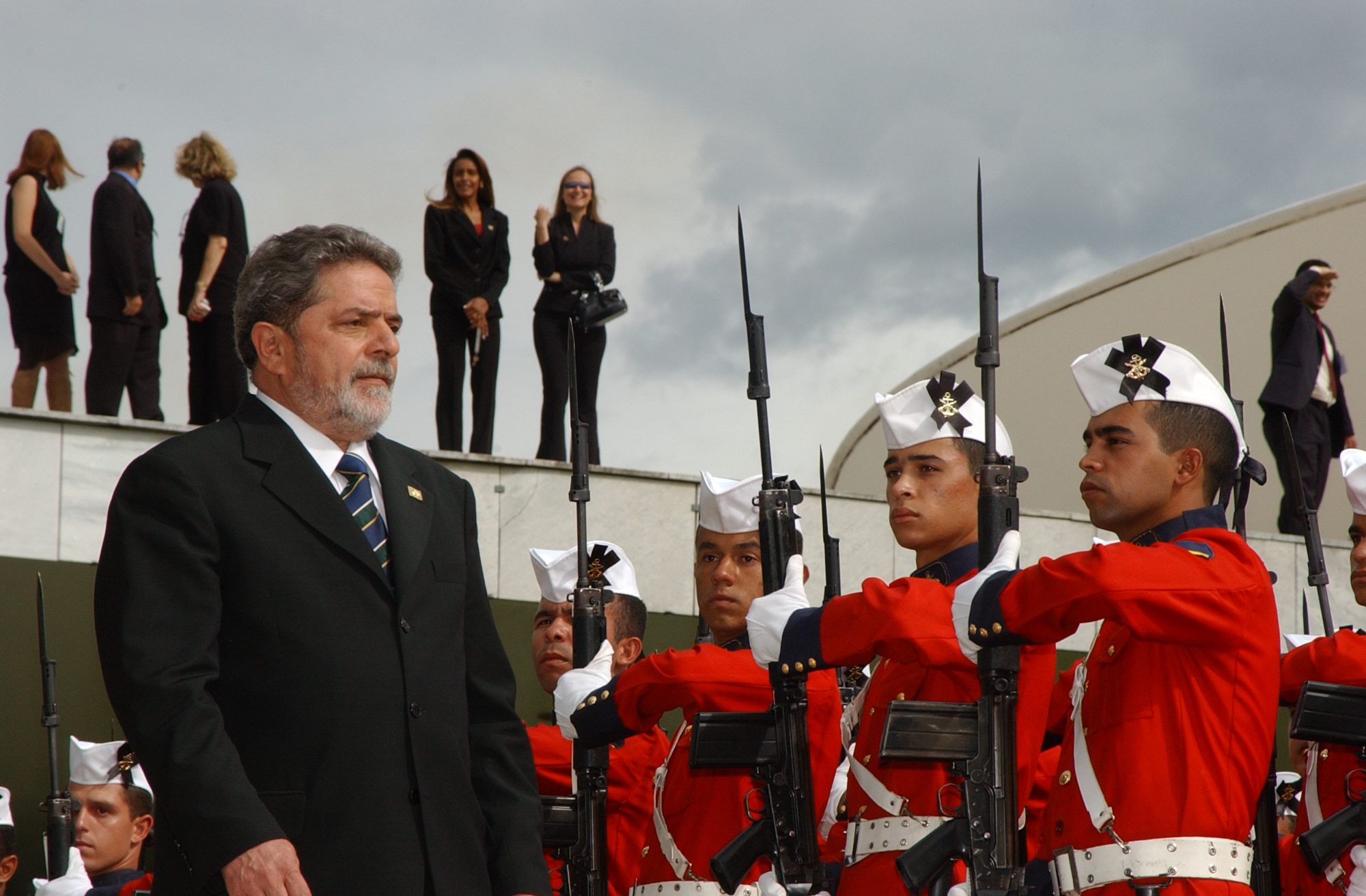 Cerimônia de posse do presidente Luiz Inácio Lula da Silva, em janeiro de 2003. Foto: Márcia Kalume